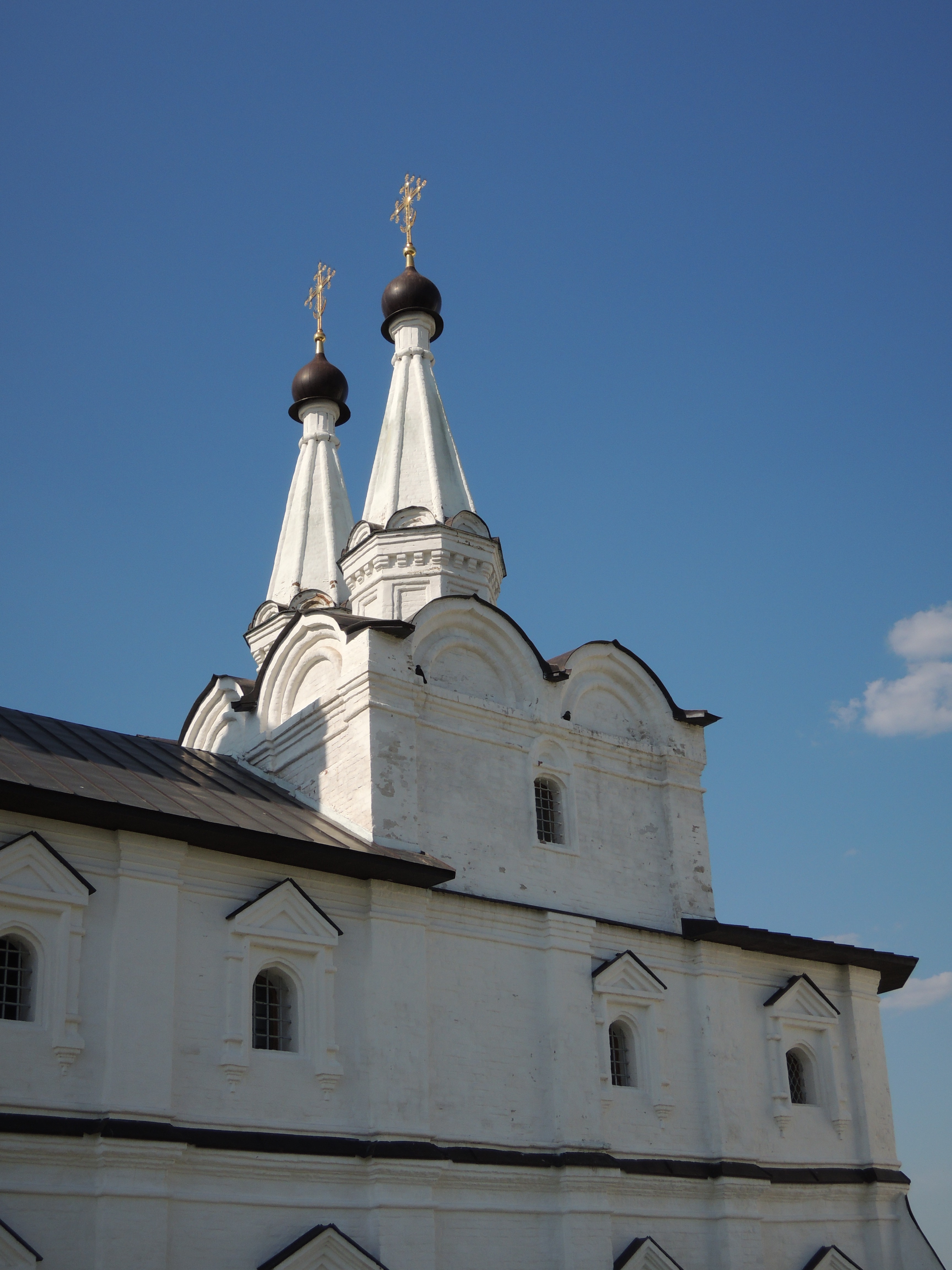 Спасо-Преображенский Воротынский монастырь (Спас на Угре, На-Усть-Угры-Спасо-Воротынский монастырь)